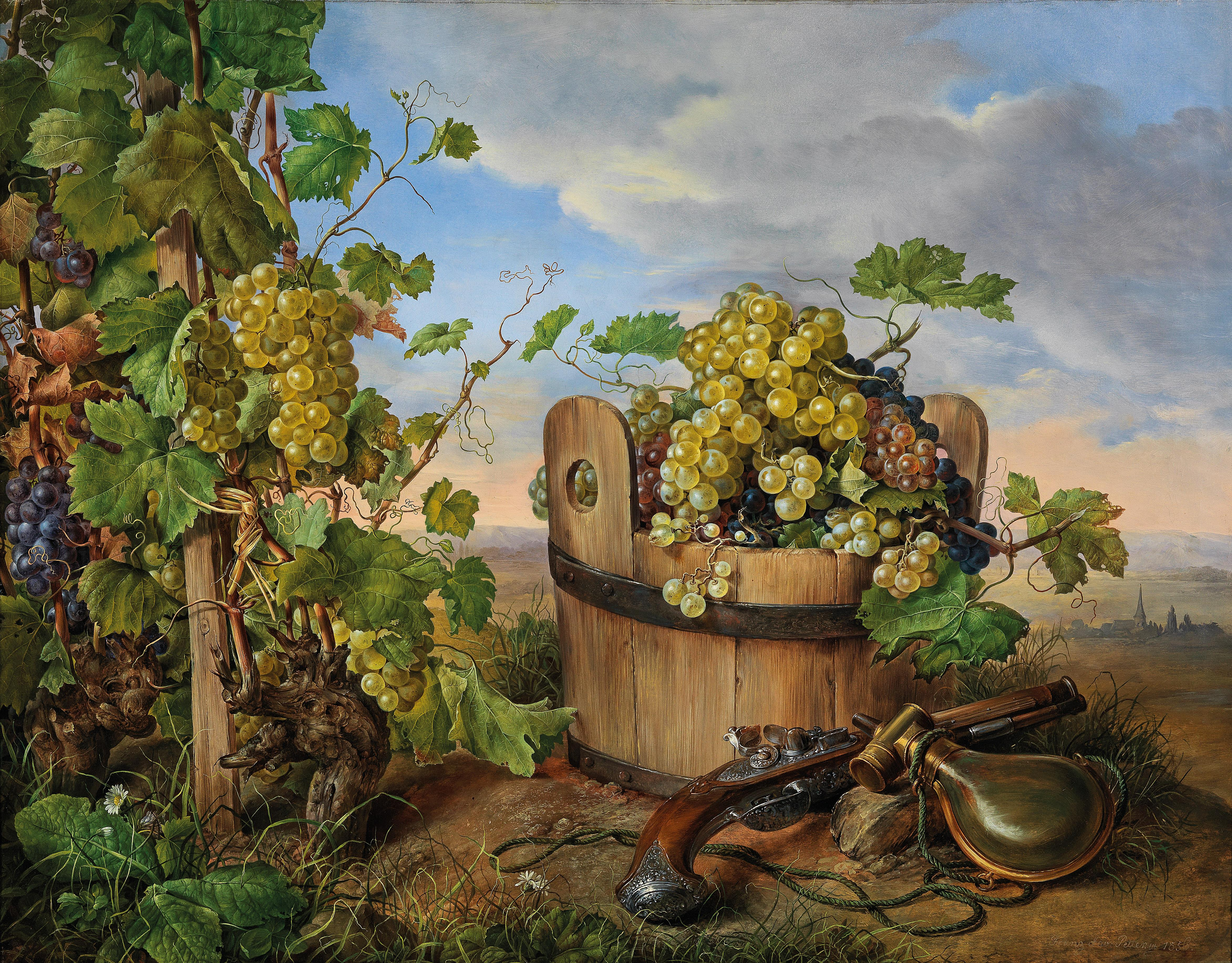 Grosses Stillleben mit Weintrauben, Steinschlosspistole und Pulverflasche, im Hintergrund eine Kirche